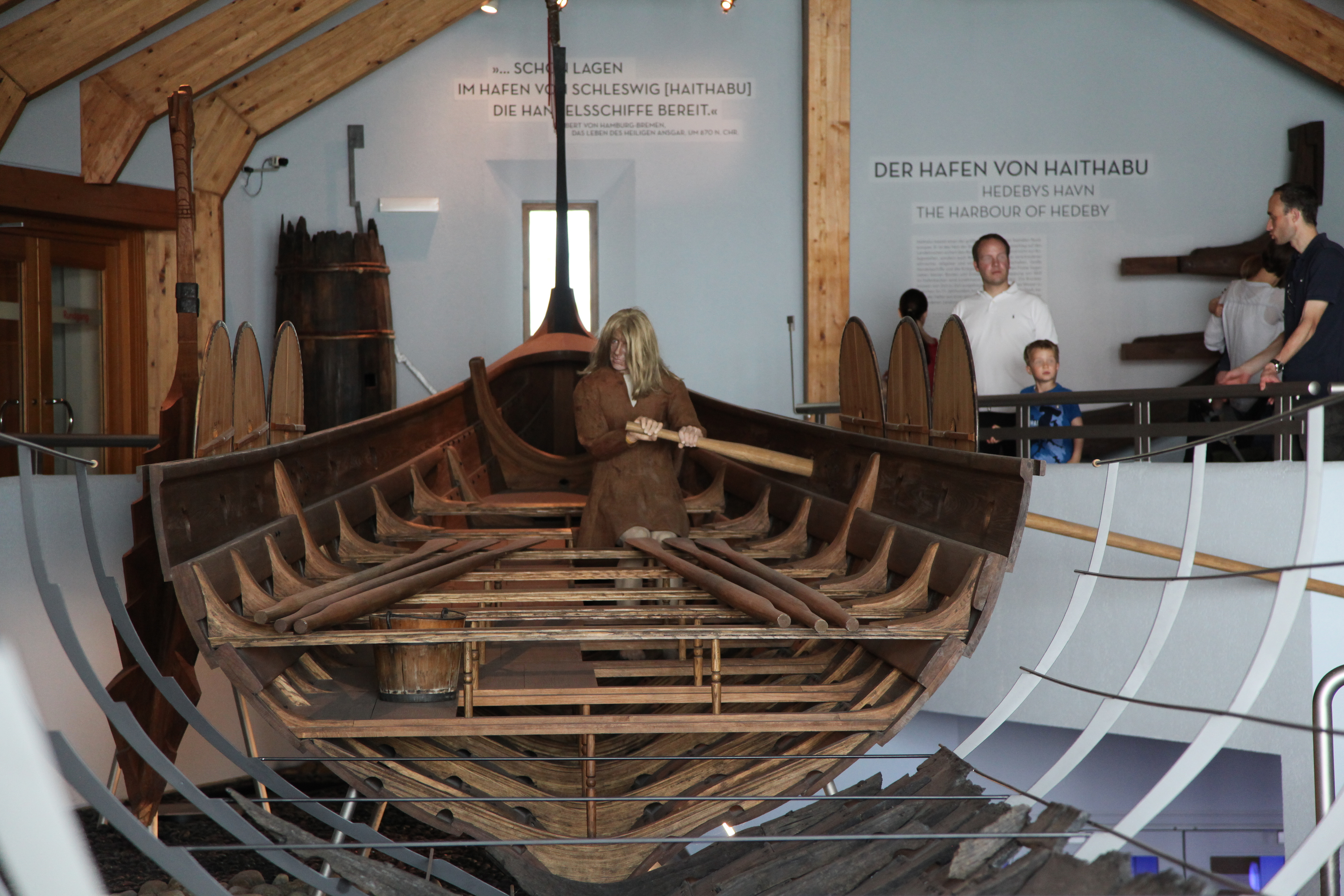 Wikinger Museum Haithabu, Am Haddebyer Noor 5 in Busdorf